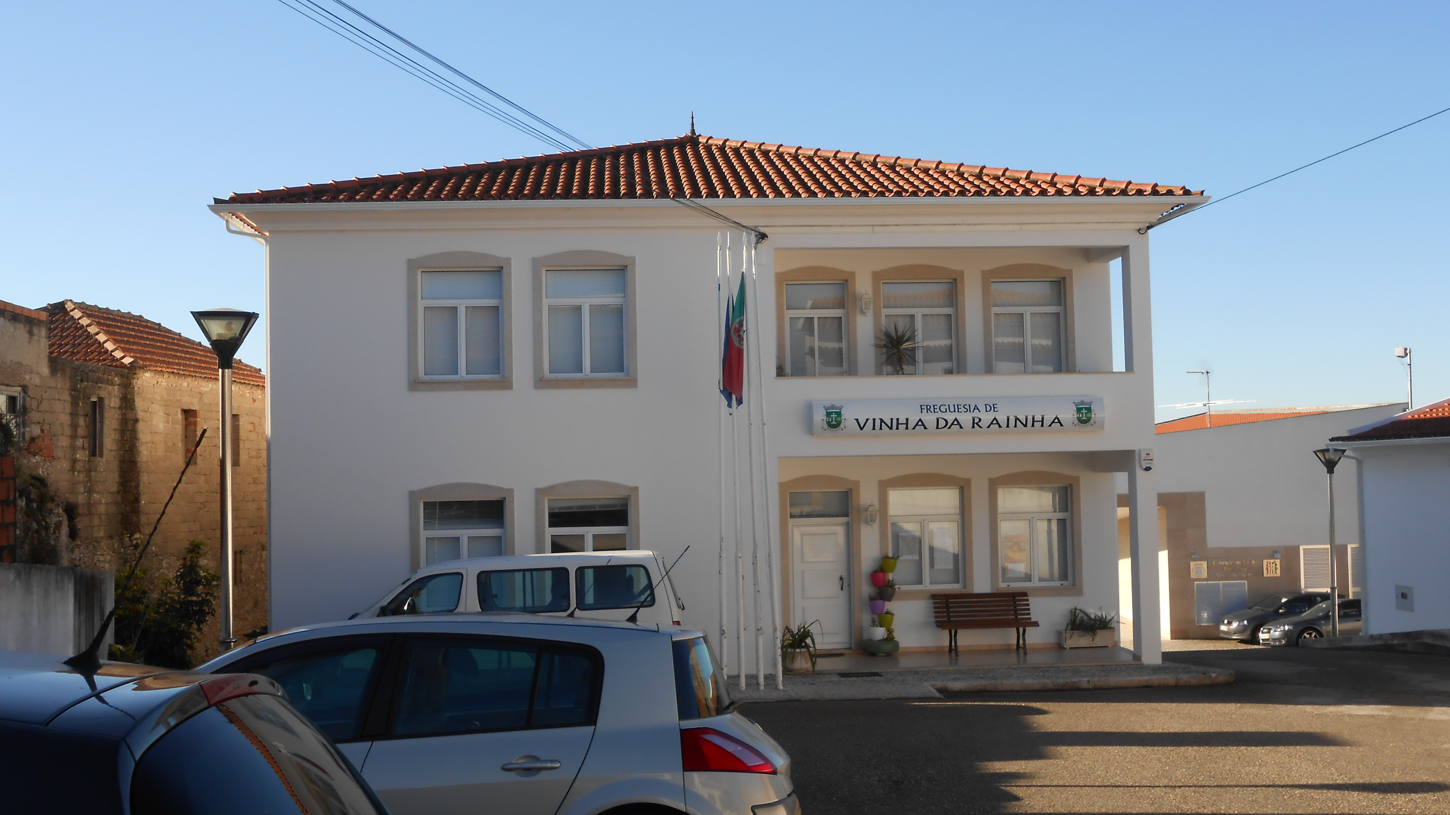 Verwaltung der Gemeinde Vinha da Rainha, Kreis Soure, in Portugal.